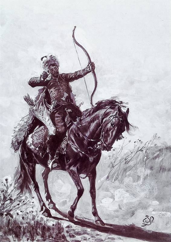 Łucznik tatarski. Tusz, gwasz. 34,3 x 25 cm.